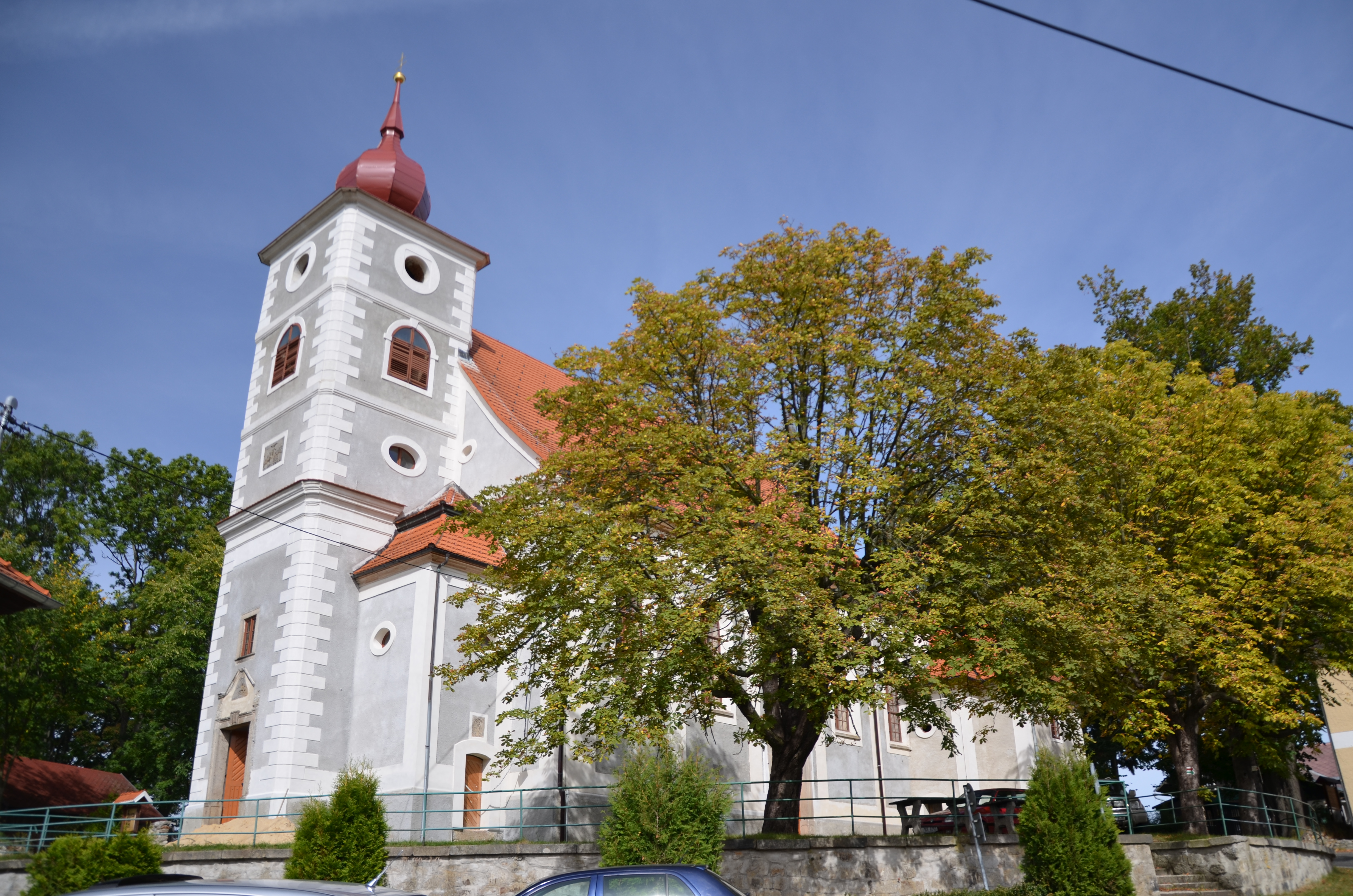 Kostelní_Bříza_-_kostel Sv. Petra a Pavla - Pohled od jihozápadu